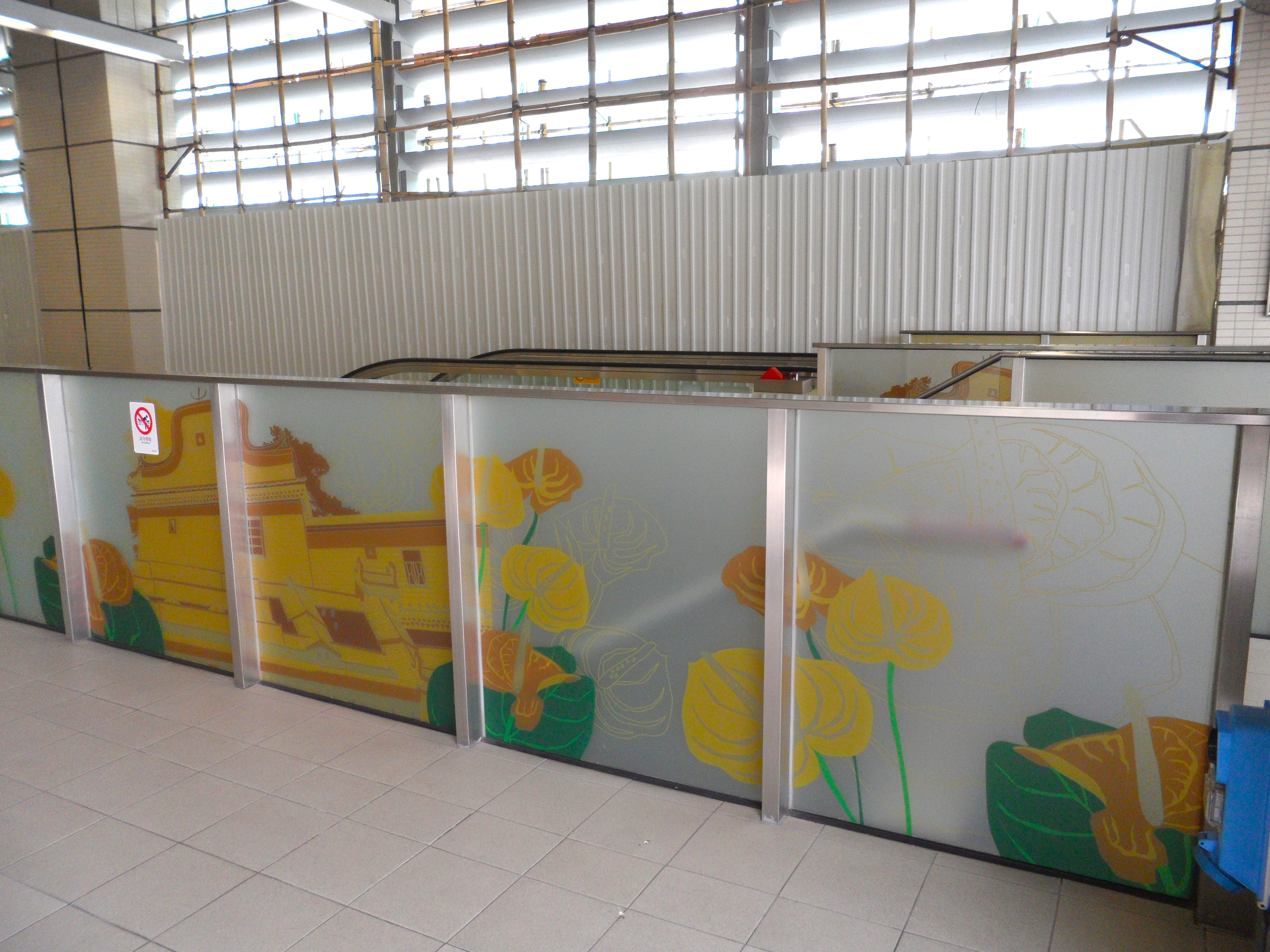 港鐵車公廟站月台佈置